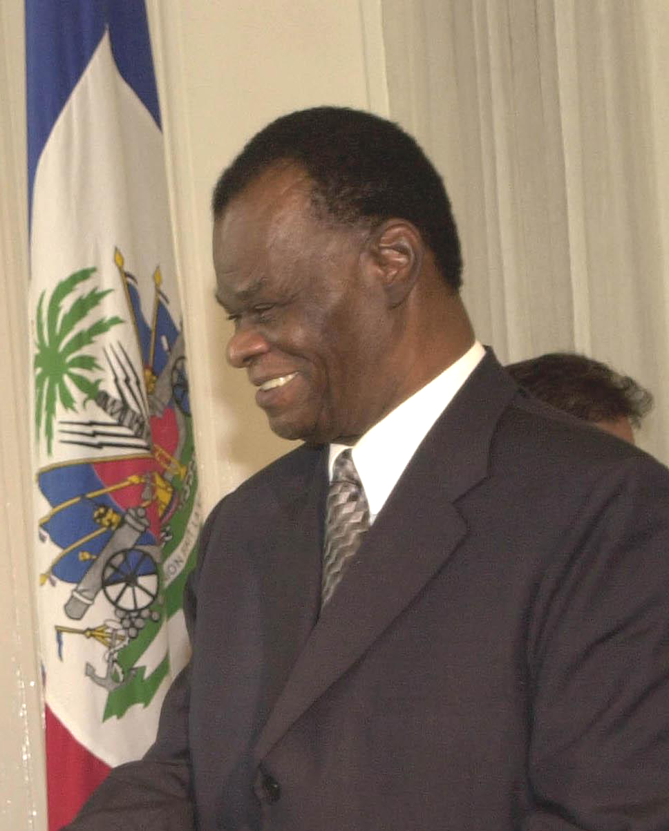 O presidente do Haiti Boniface Alexandre.